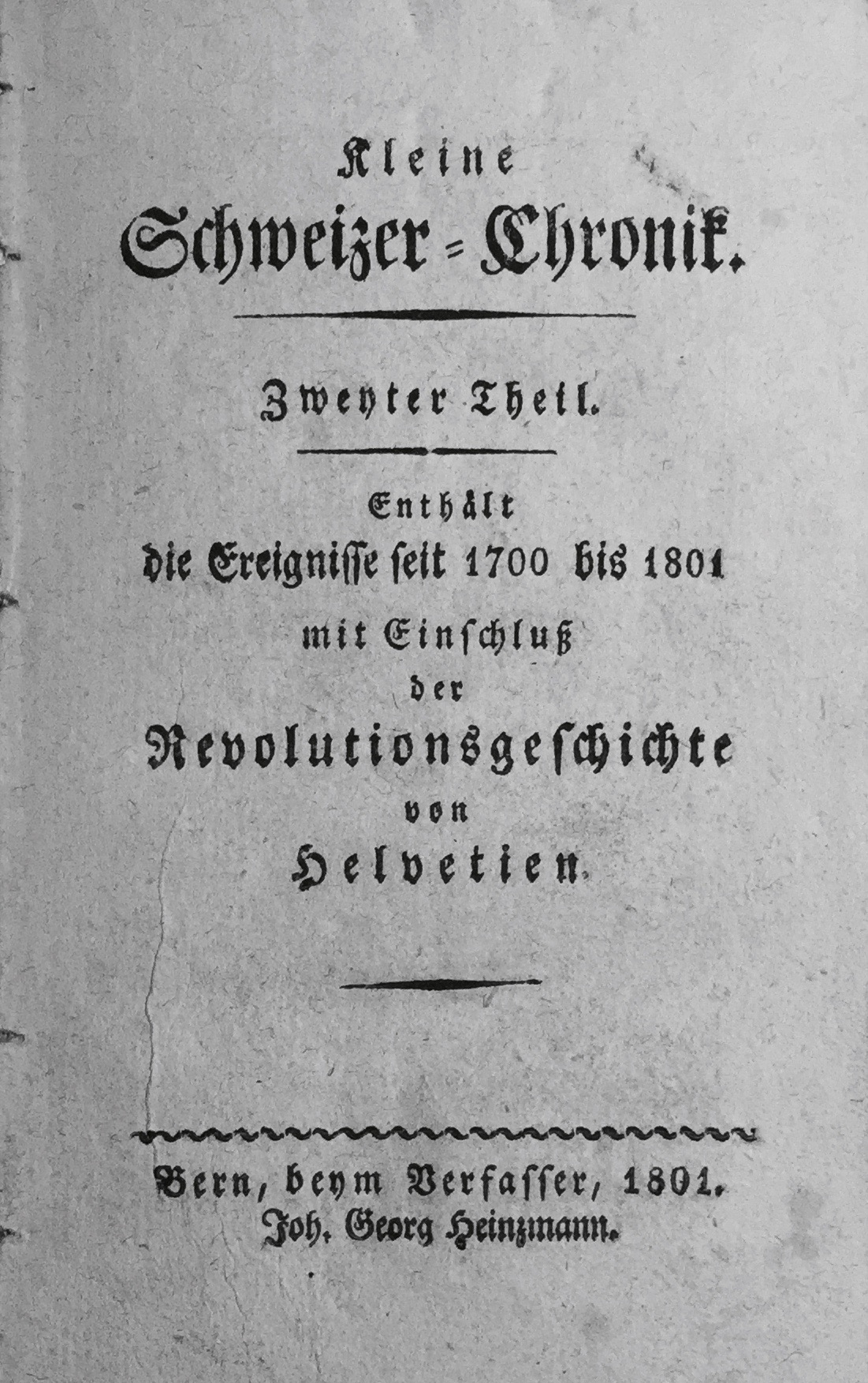 Johann Georg Heinzmann: Kleine Schweizer-Chronik. 2. Theil, Bern 1801.